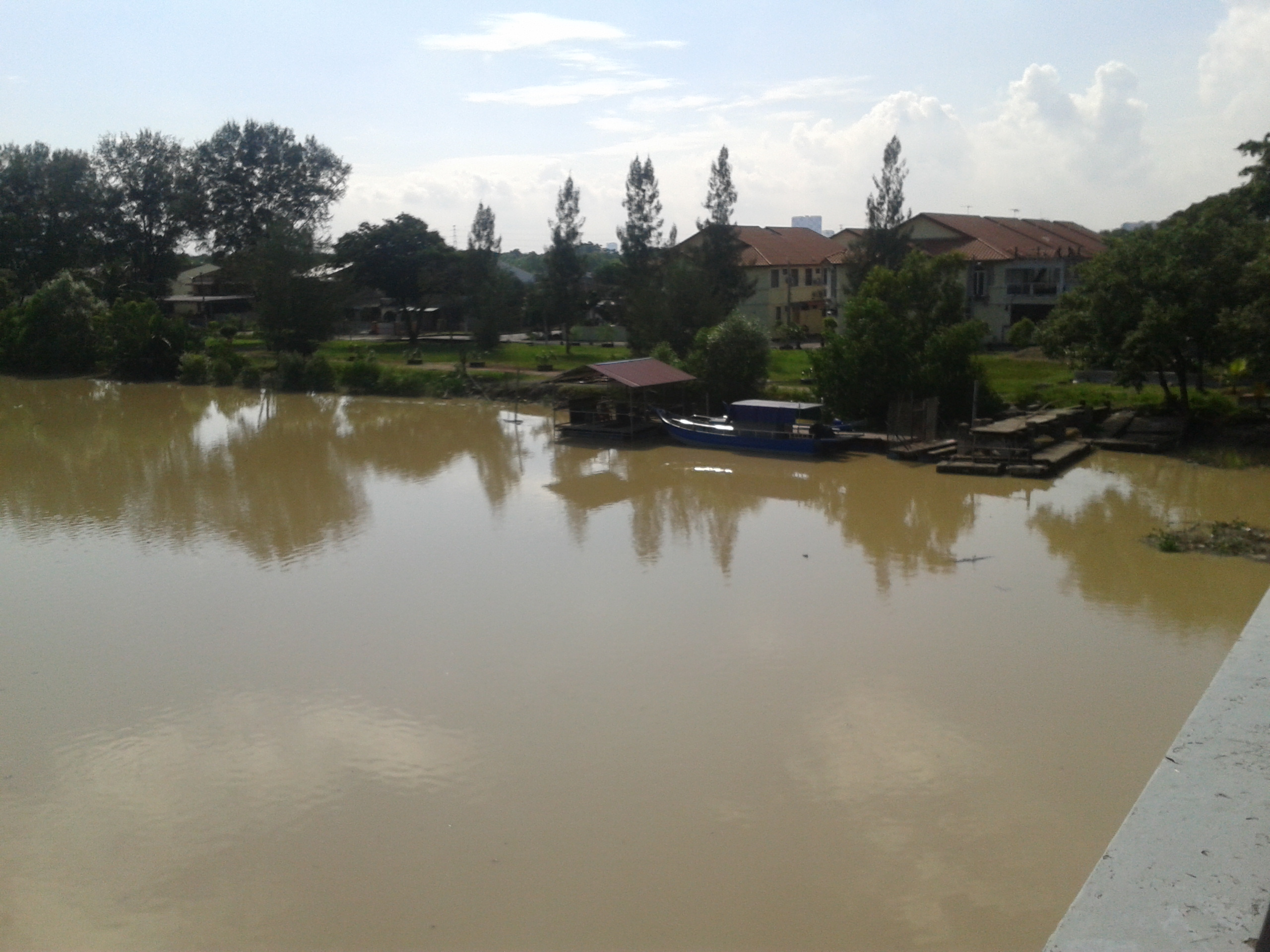 Pier off Persiaran Bawal, access apparently locked, picture taken from Bridge Jalan Chain Ferry